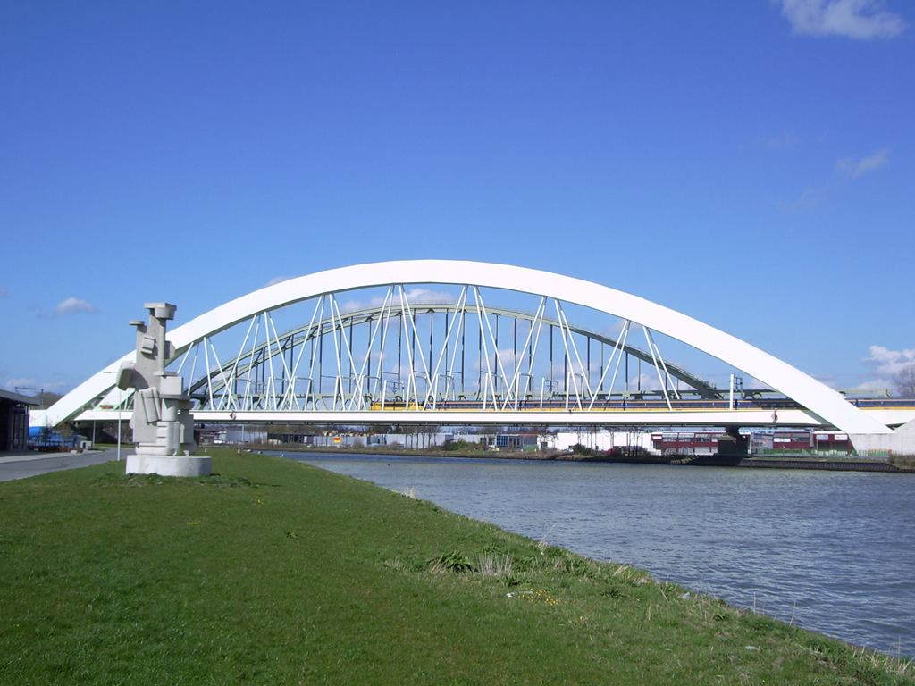 Werkspoorbrug (Werkspoorbridge) near Utrecht, the Netherlands. April 2006.